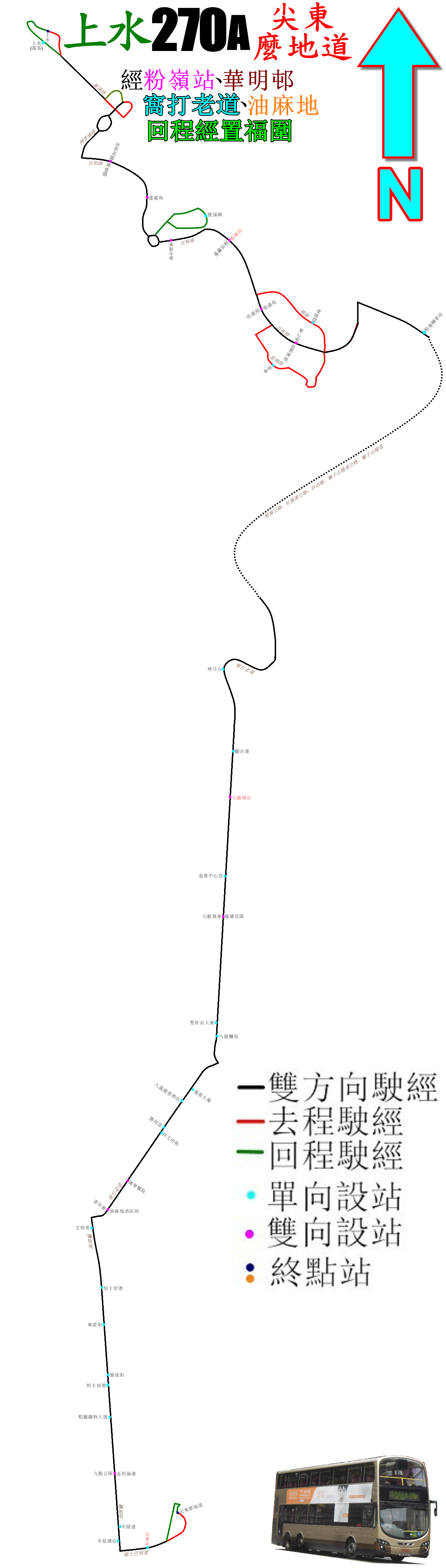 中文（香港）: 九巴270A線私走線圖